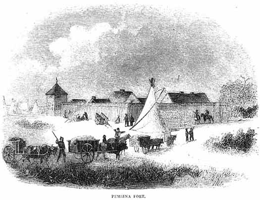 Fort Pembina, Pembina, North Dakota.